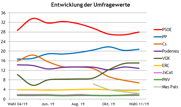 Spanien Wahl 19